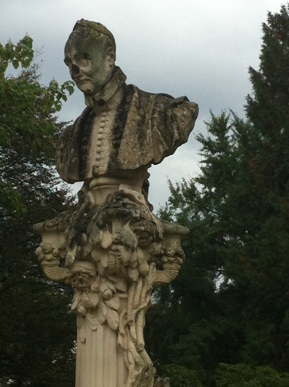 Buste de Ronsard sculpté en 1924 par Georges Delpérier